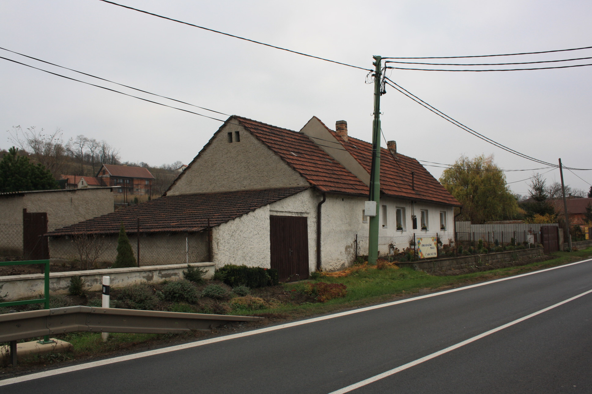 Dům číslo popisné 54 v Dolní Vinici, části obce Kly (pohled od západu).